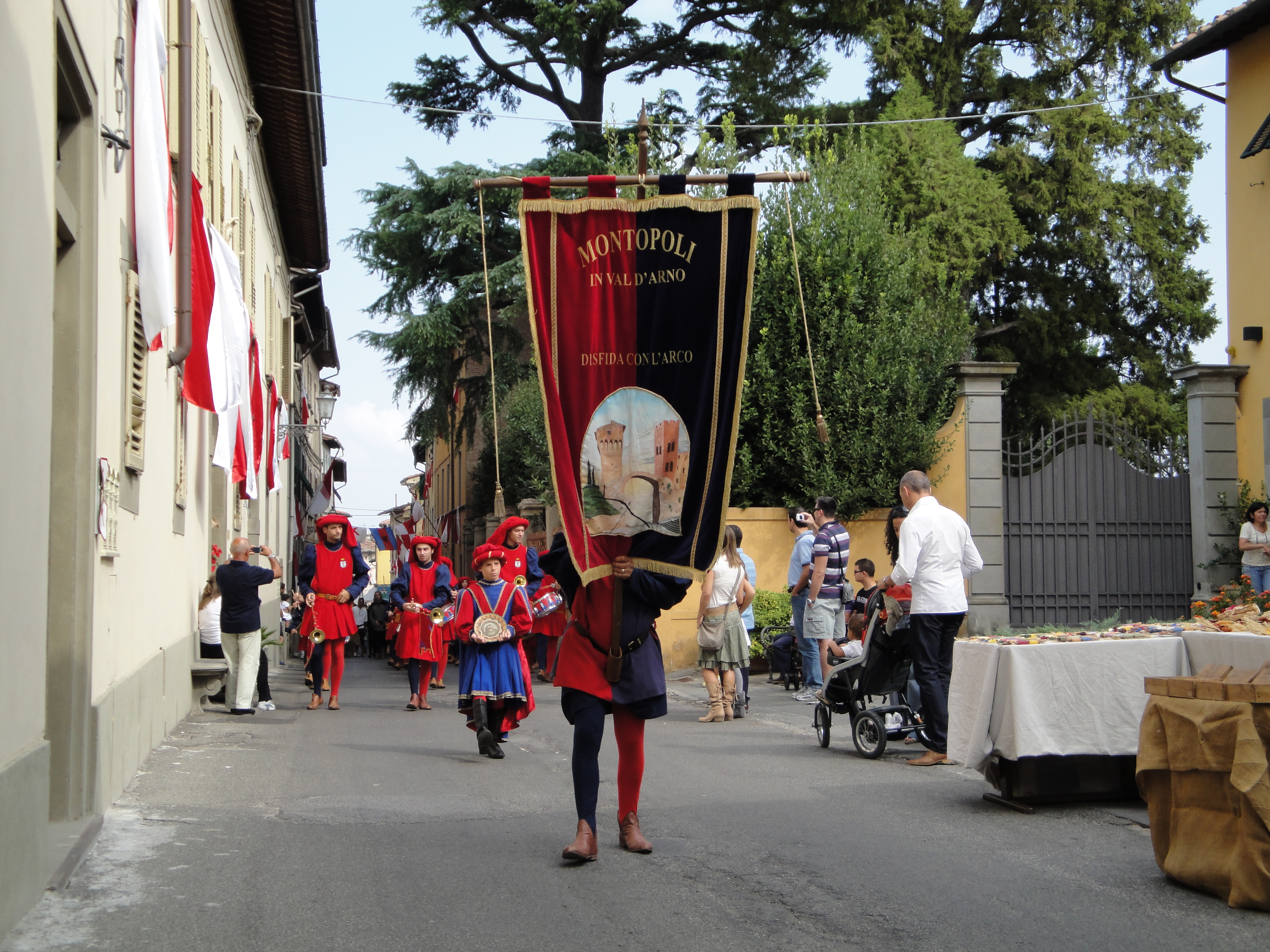 Corteo storico di Montopoli